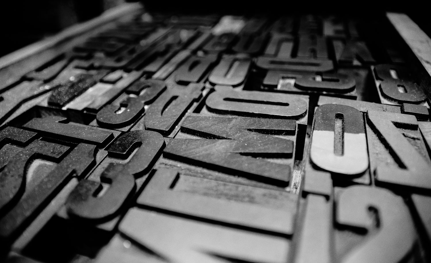 Caratteri mobili di grandi dimensioni presenti in una tipografia tradizionale del XX secolo.